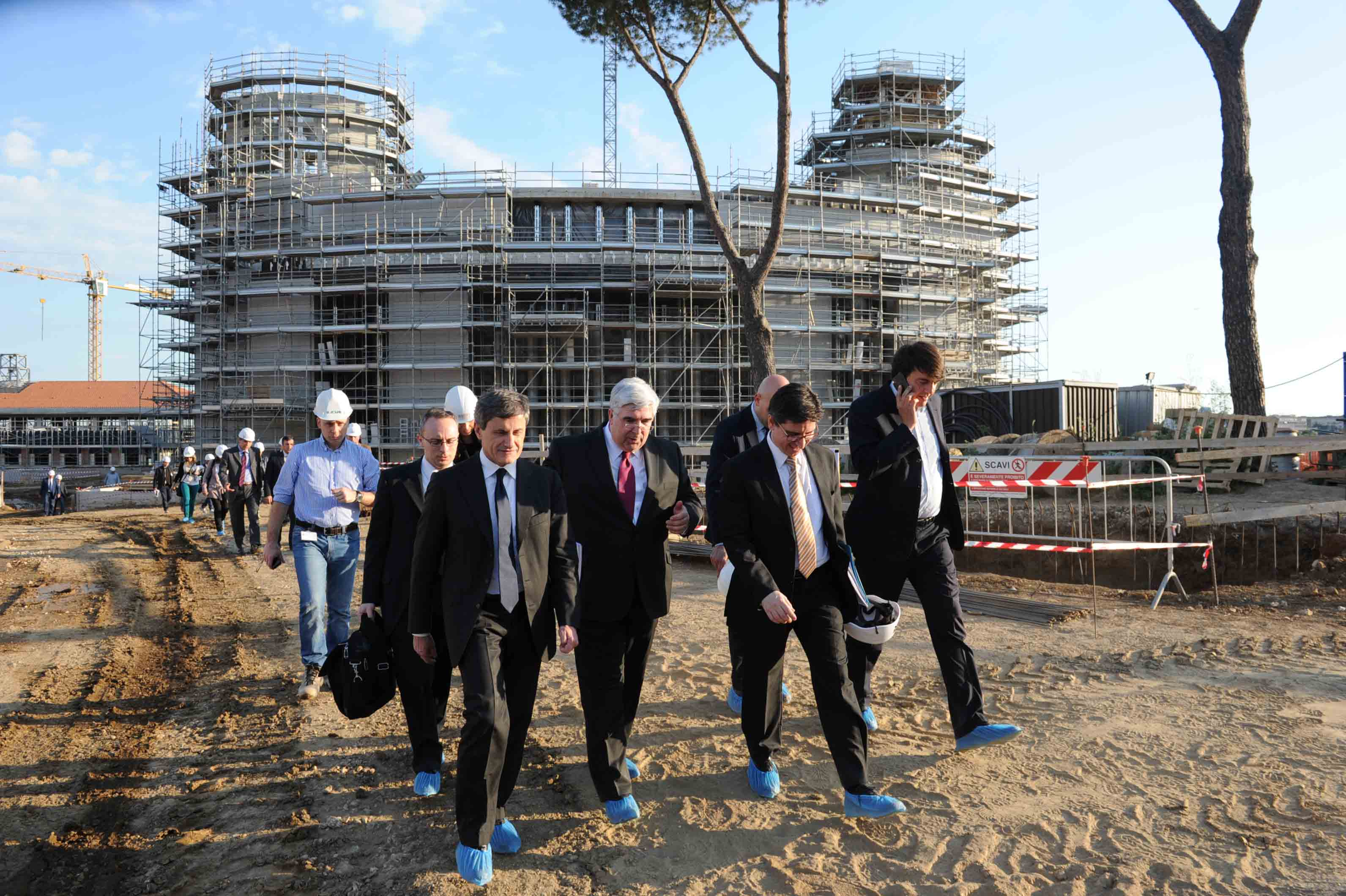 Foto di C. Valletti